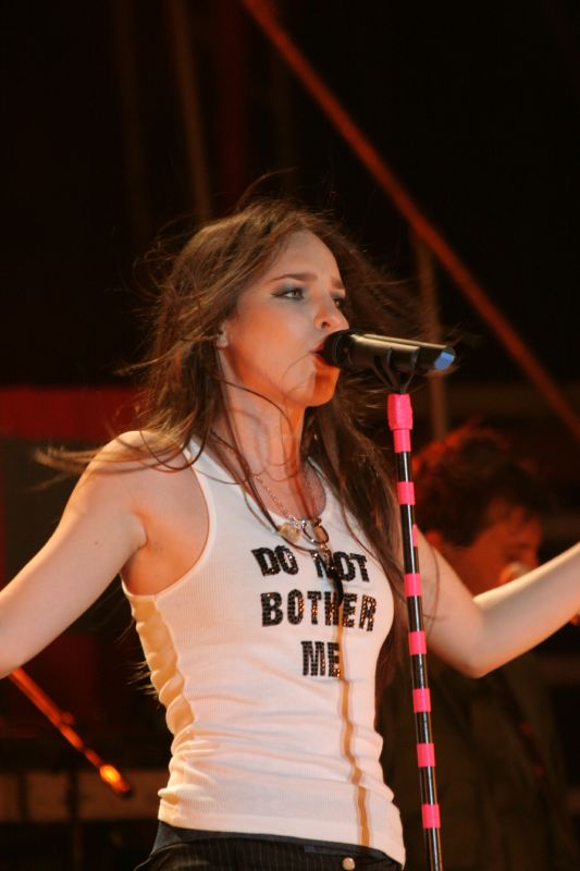 Belinda durante apresentação na Nicaragua, em 2007.